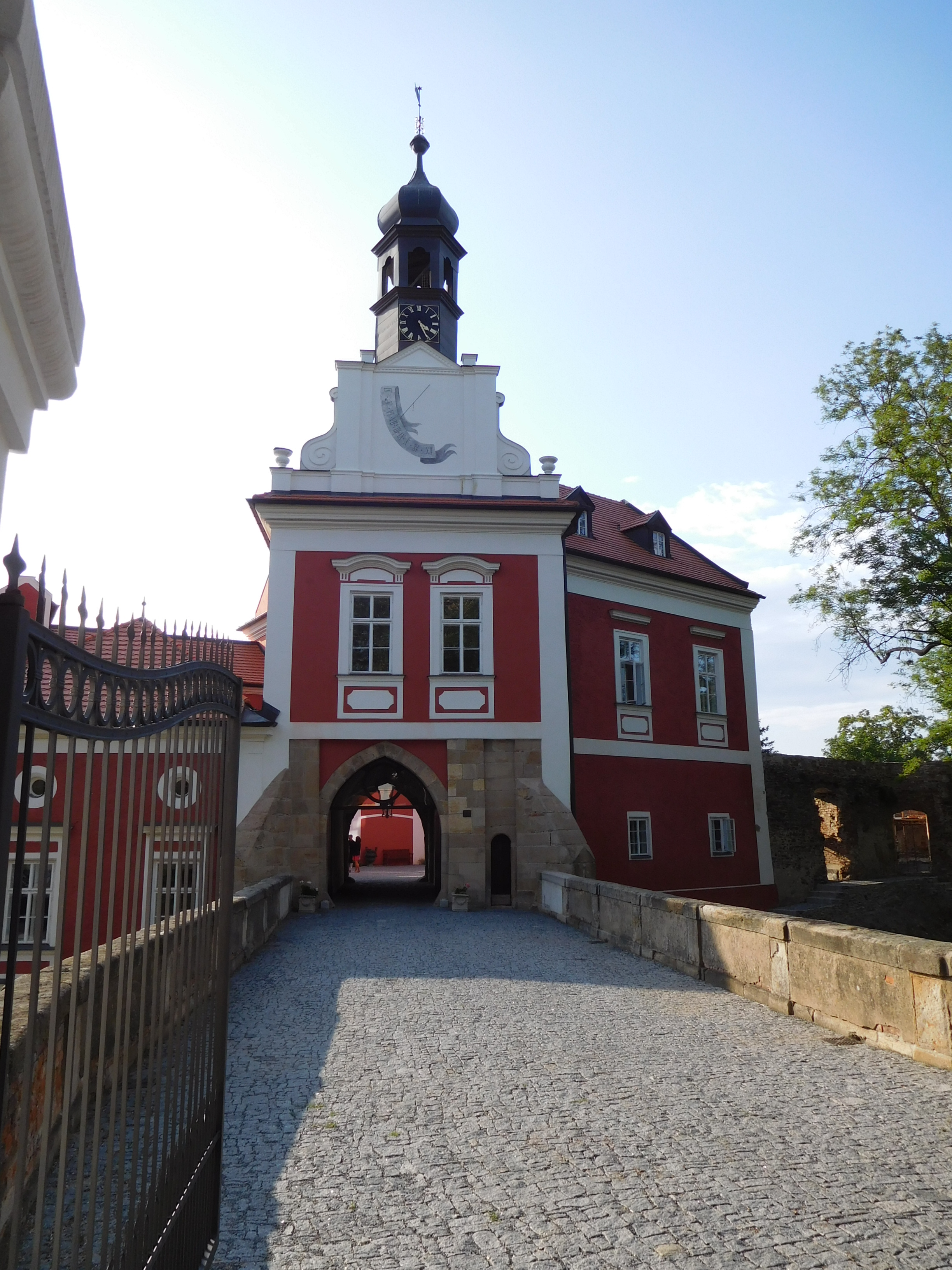 Škvorec - Starý zámek